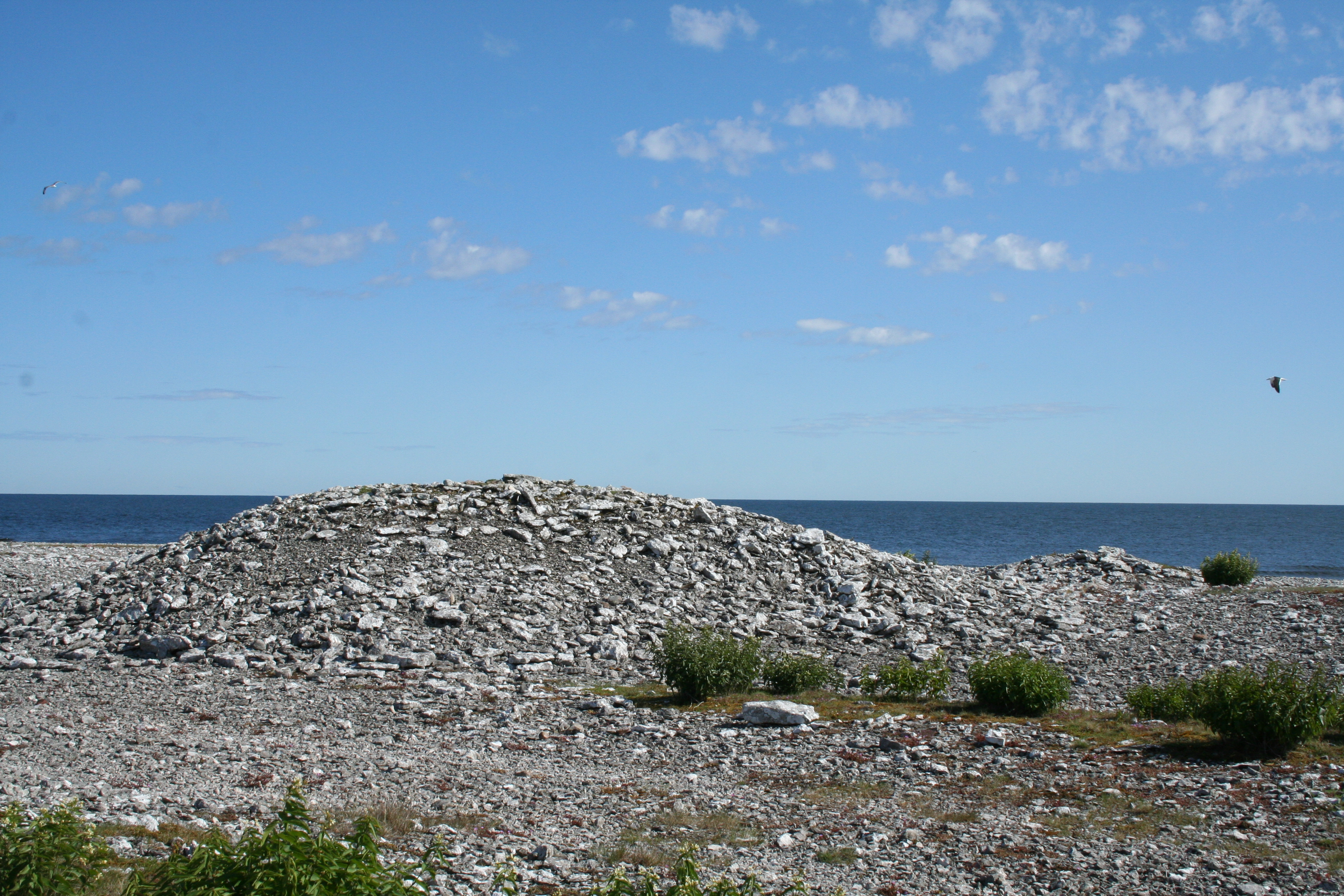 Gravrösen på Norsholmen, Fårö, Gotland